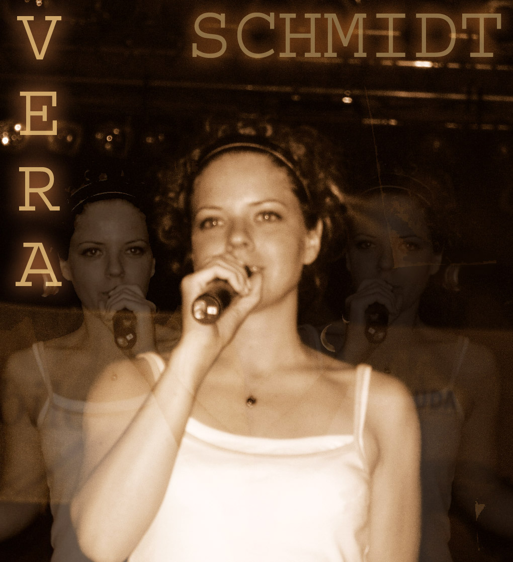 Schmidt Vera fellépés közben (Budapest, XI. kerület, Újbuda Koncert)